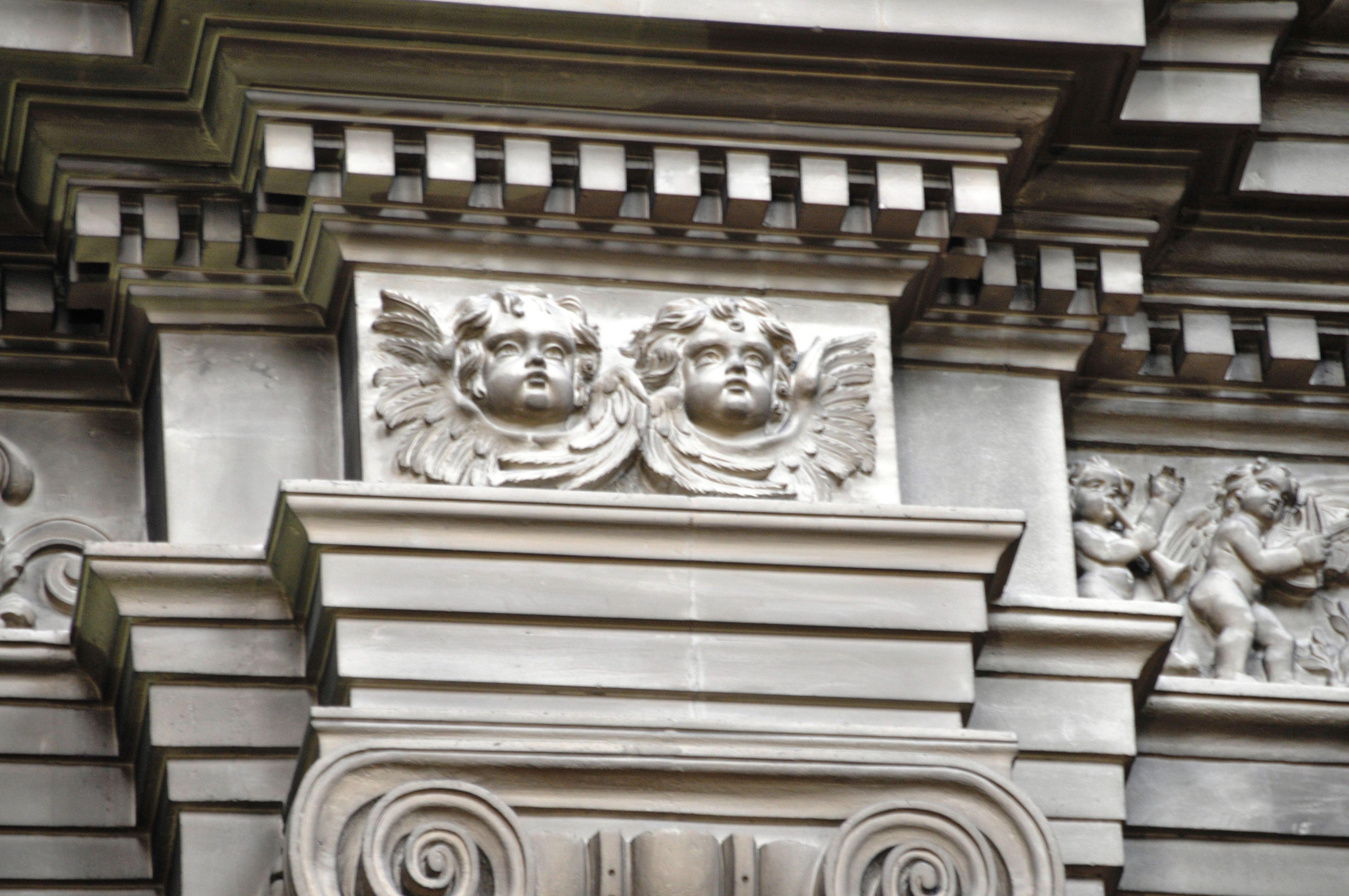 Dax, Kathedrale, Säulenschlusssteine mit Engelsköpfen